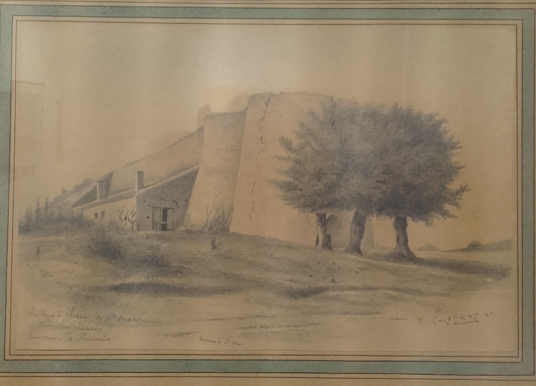 Le four à chaux de Ste marie Près des Léards, environs d'Ancenis. Jean Coraboeuf (1870-1947)